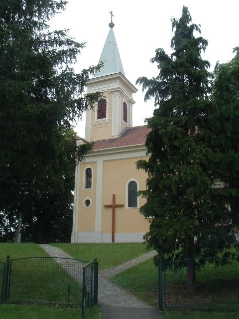 The Roman Catholic Church in Salköveskút, Hungary. Szent Mihály római katolikus templom